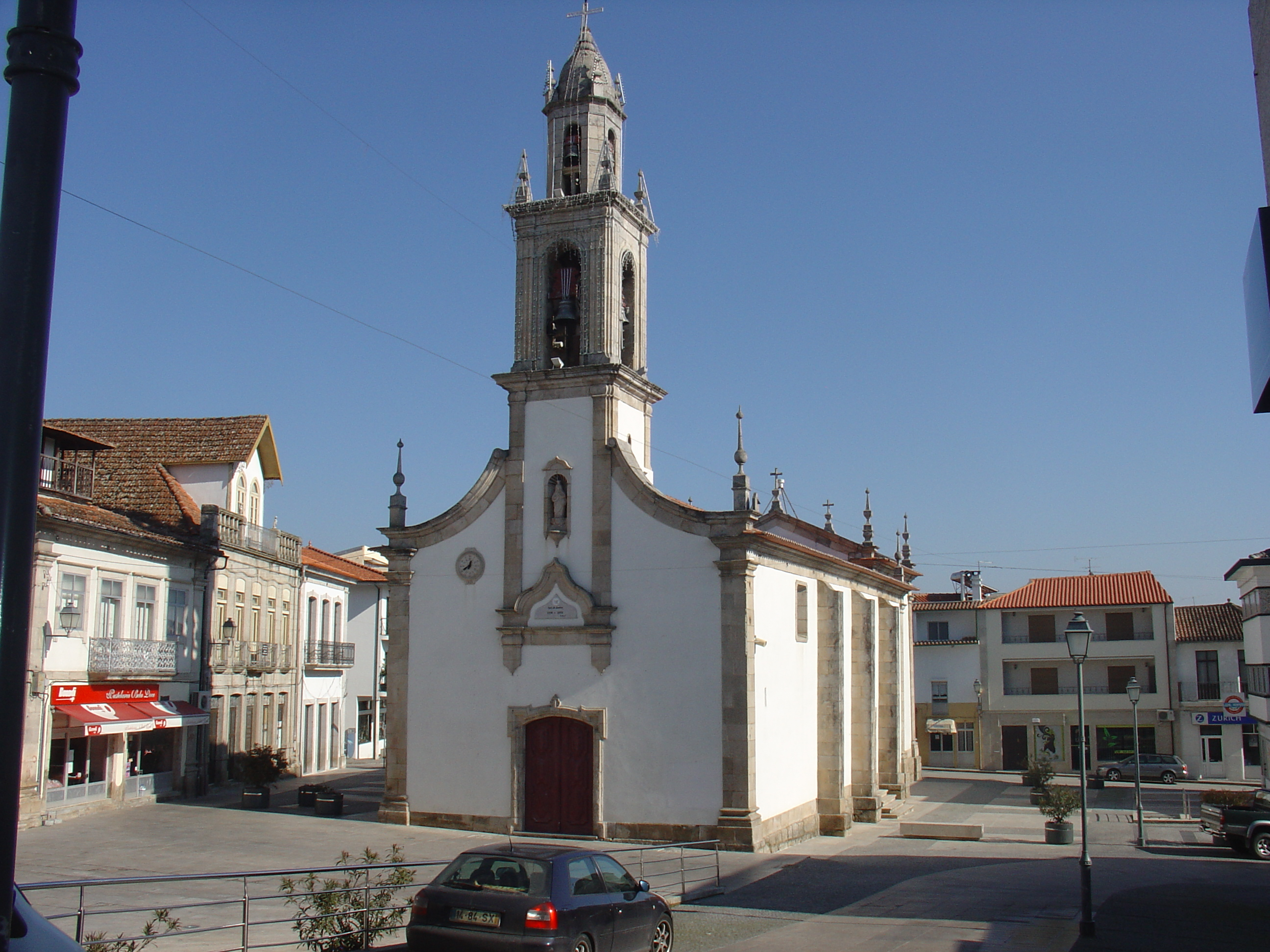 Qaraqalpaqsha: Valpaços Igreja